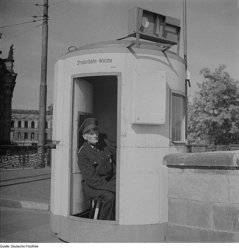 Original image description from the Deutsche Fotothek Dresden. Stellwerkshäuschen mit Straßenbahndienstposten zur Weichenfernbedienung